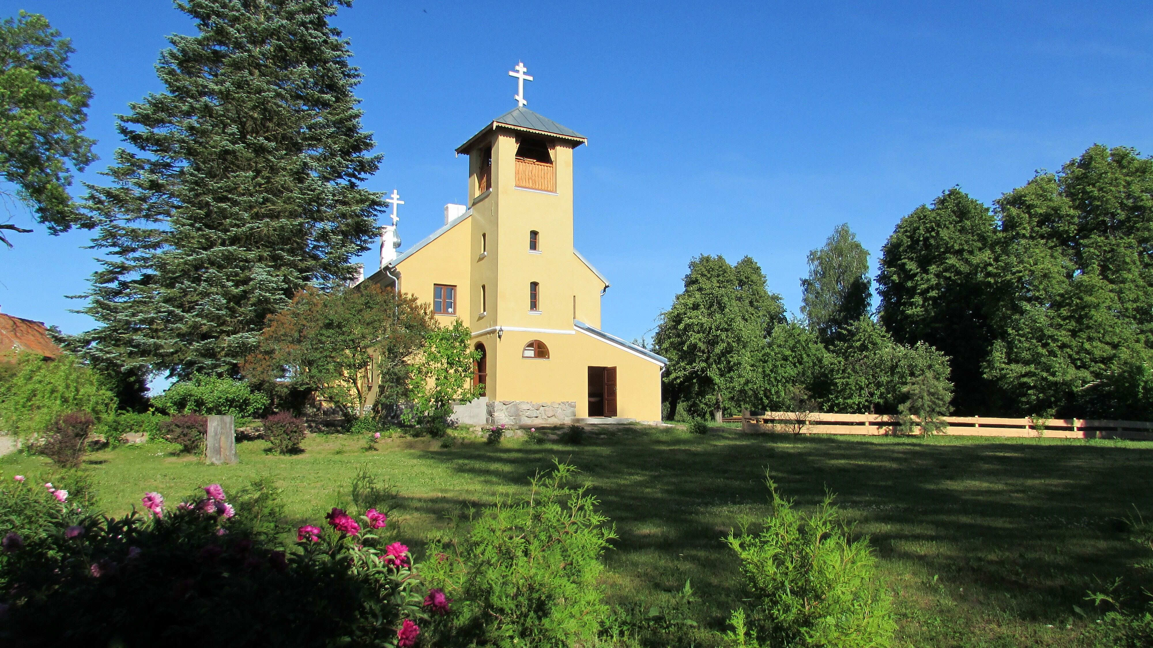 Monaster staroobrzędowy Zbawiciela i Trójcy Świętej w Wojnowie